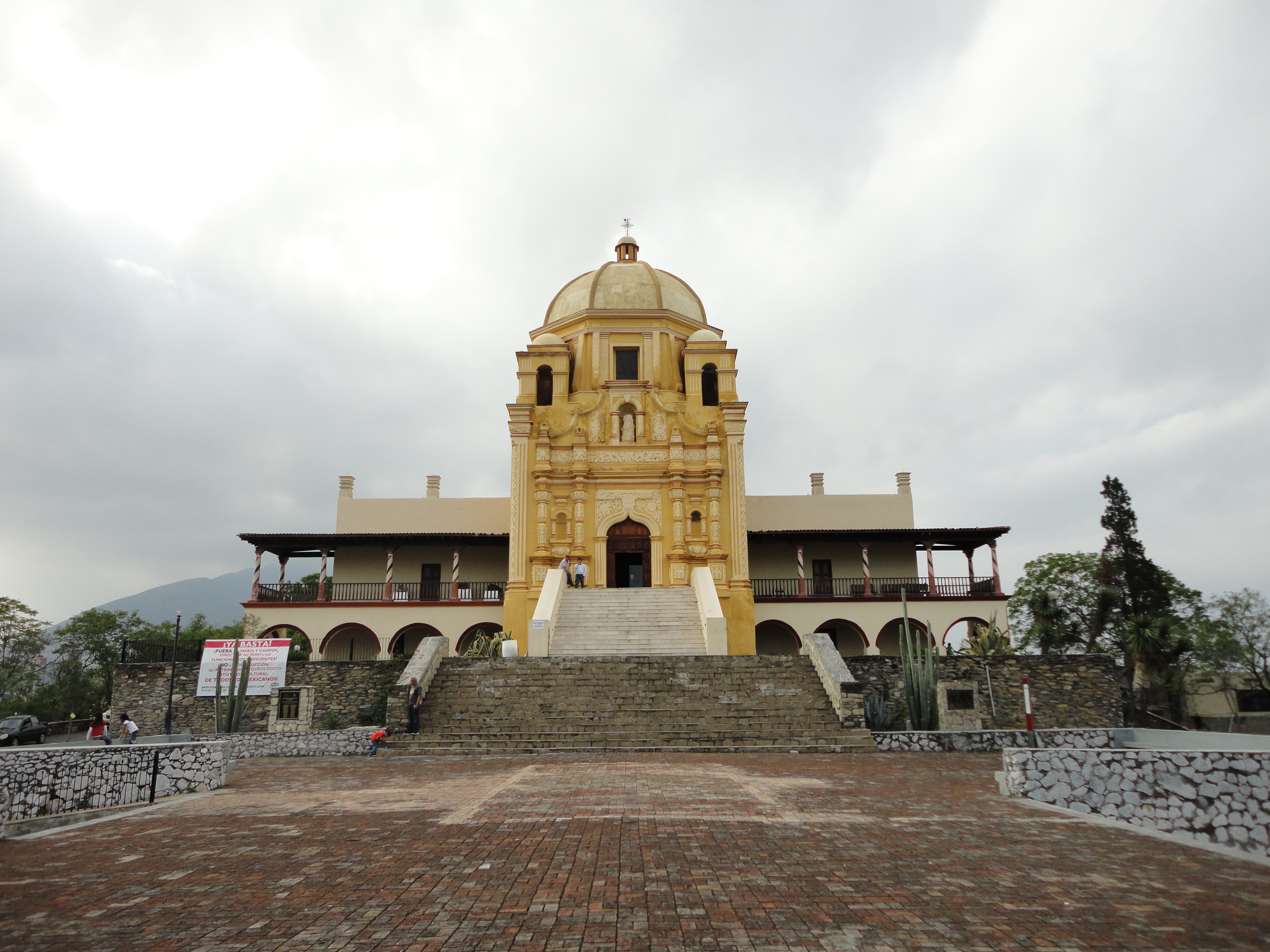 Antiguo Obispado o Museo Regional de Nuevo León